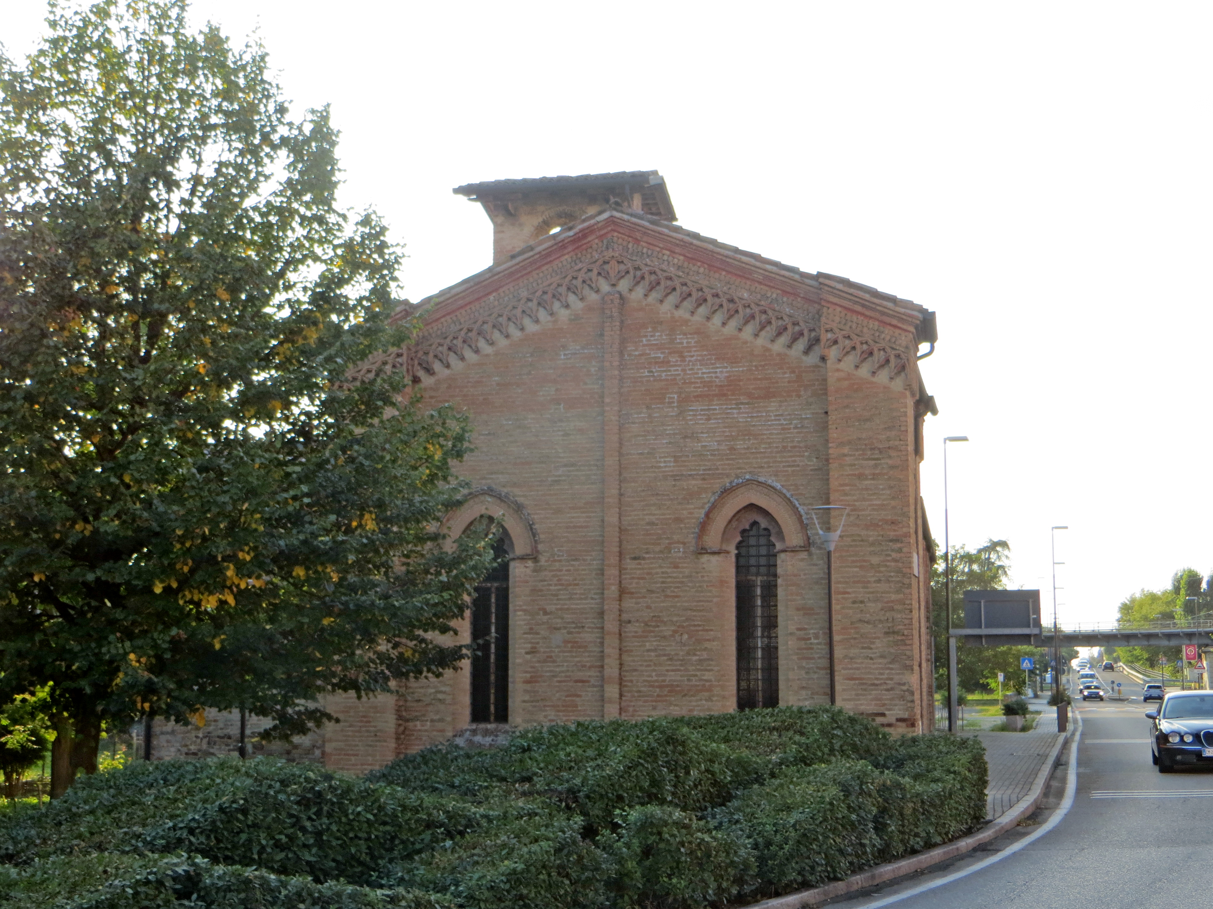 Chiesa di Sant'Antonio Abate (Fidenza) - retro